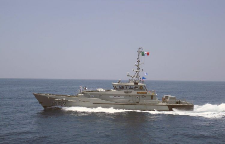 Patrulla Costera Clase Tenochtitlan